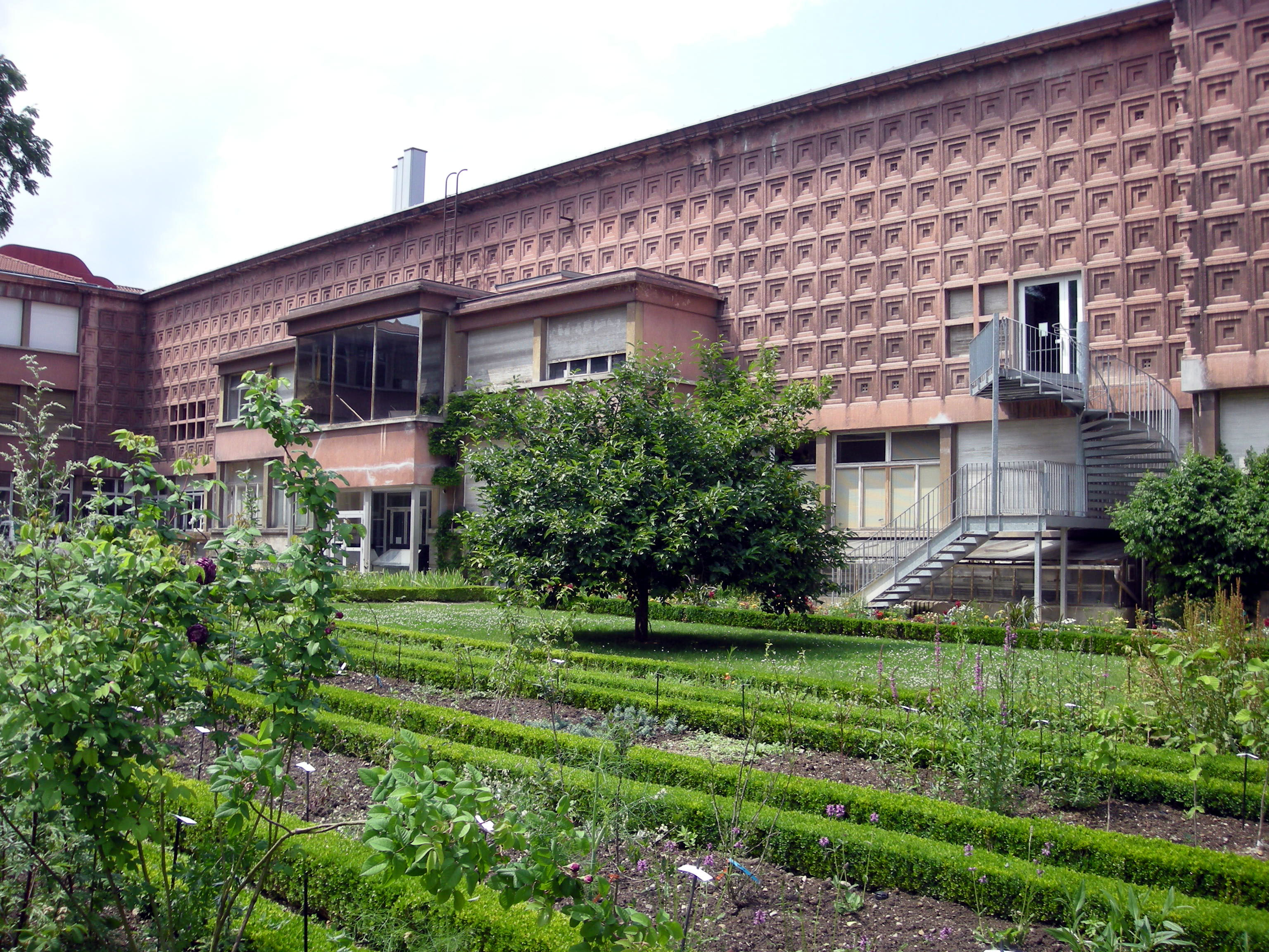 Façade arrière du Musée-Aquarium de Nancy, donnant sur le jardin Dominique Alexandre Godron